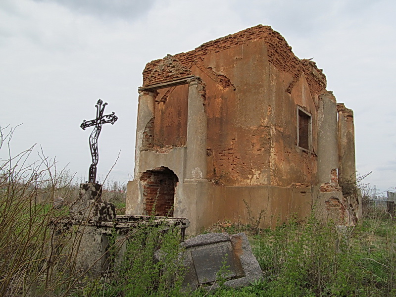 Друцкаўшчына. Капліца-пахавальня